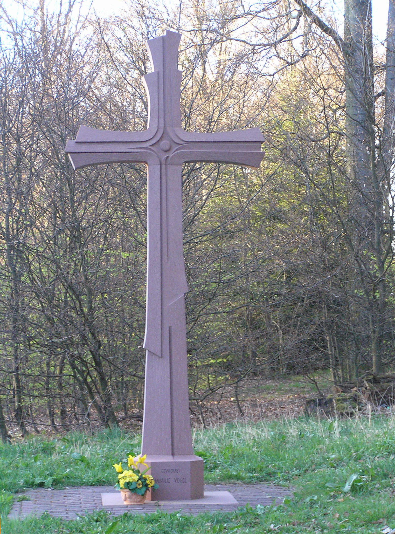 Rotes Kreuz am gleichnamigen Pass unterhalb des Feldbergs